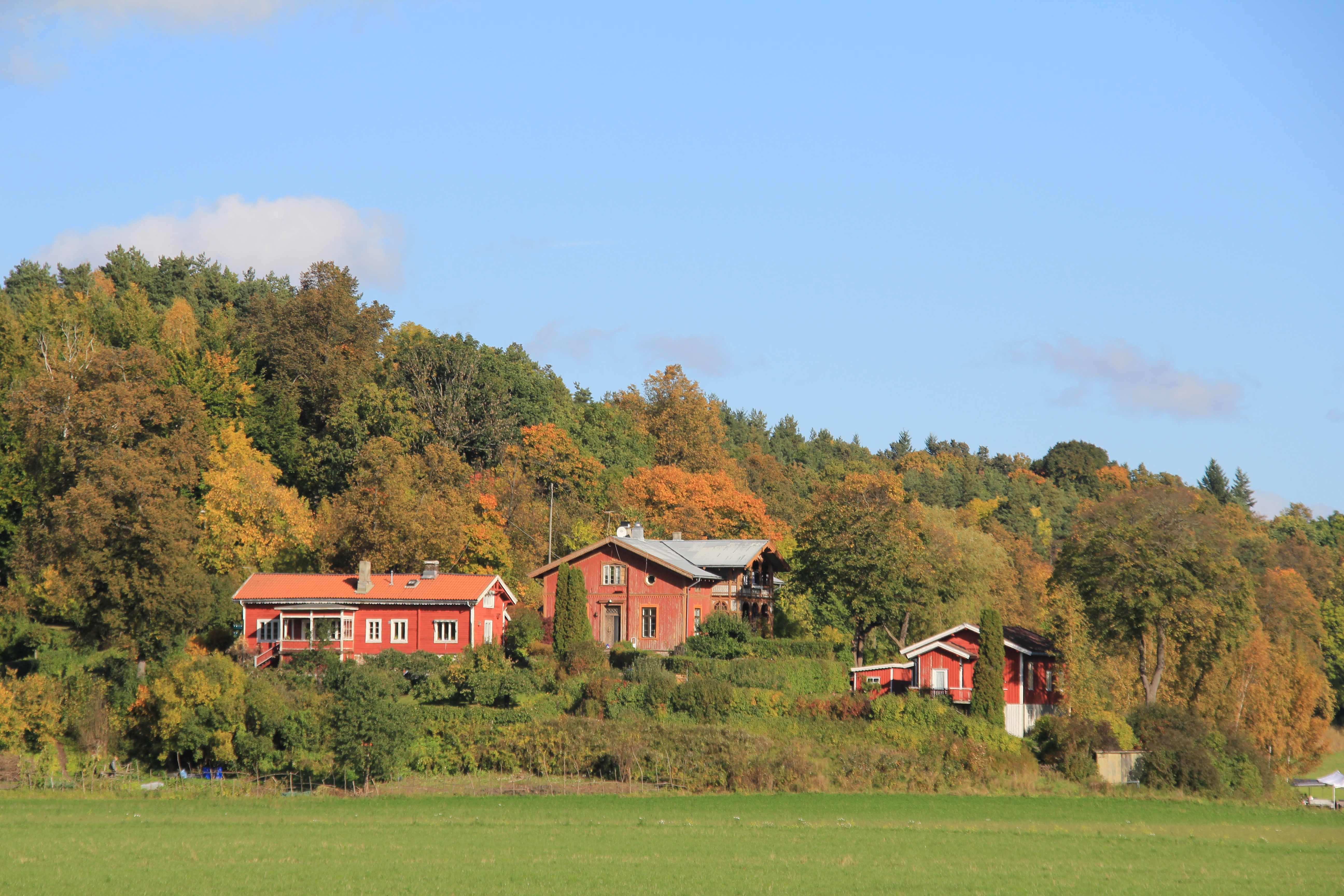 Hengsenga, Bygdøy kongsgård.